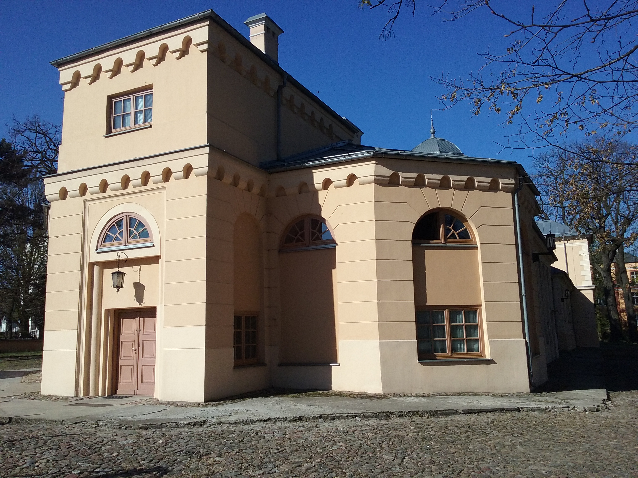 Tomaszów Mazowiecki w województwie łódzkim, PL, EU. Pałac Ostrowskich, widok od strony wschodniej, CC0